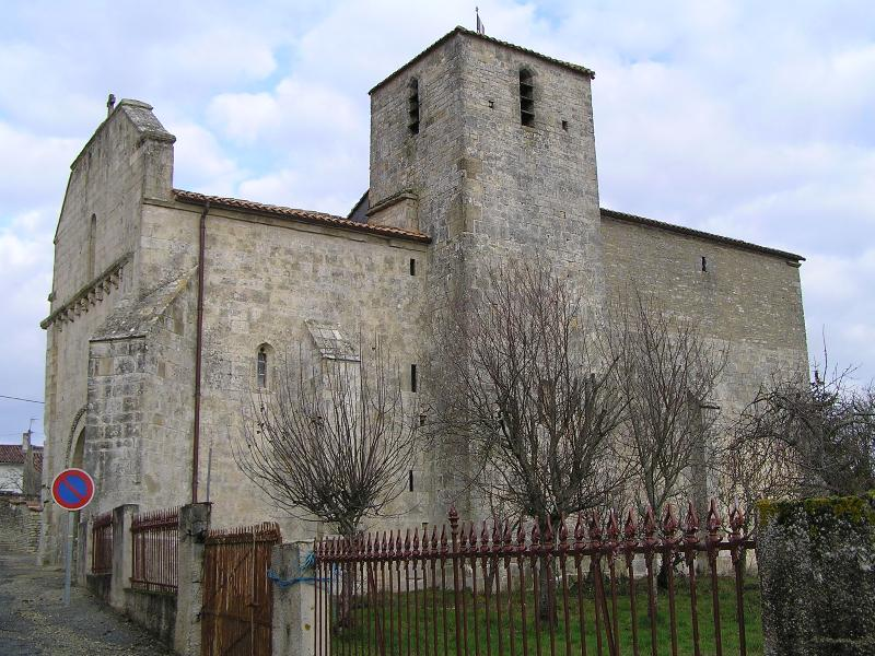 église fortifiée de Gourvillette